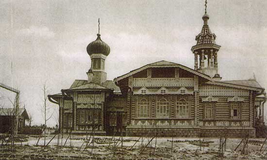 Церковь свят. Николая Чудотворца на станции Пограничная (ныне ст. Суйфэньхэ), КВЖД